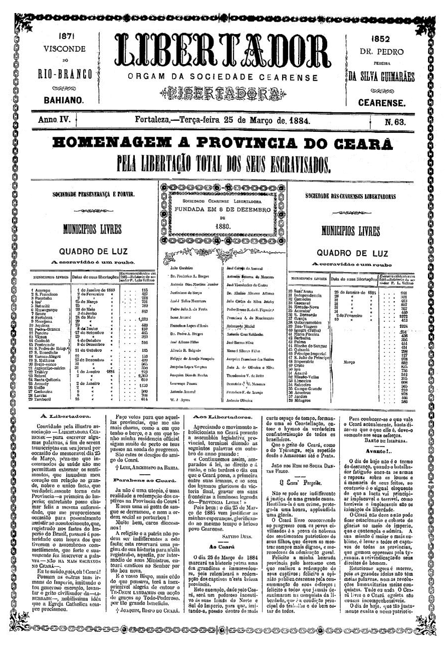 Jornal "libertador" publicado no dia 25 de março de 1884 pela Sociedade Cearense Libertadora em homenagem a libertação total dos escravos do Ceará.